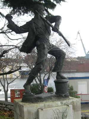 Partizanski spomenik u Kraljevici.